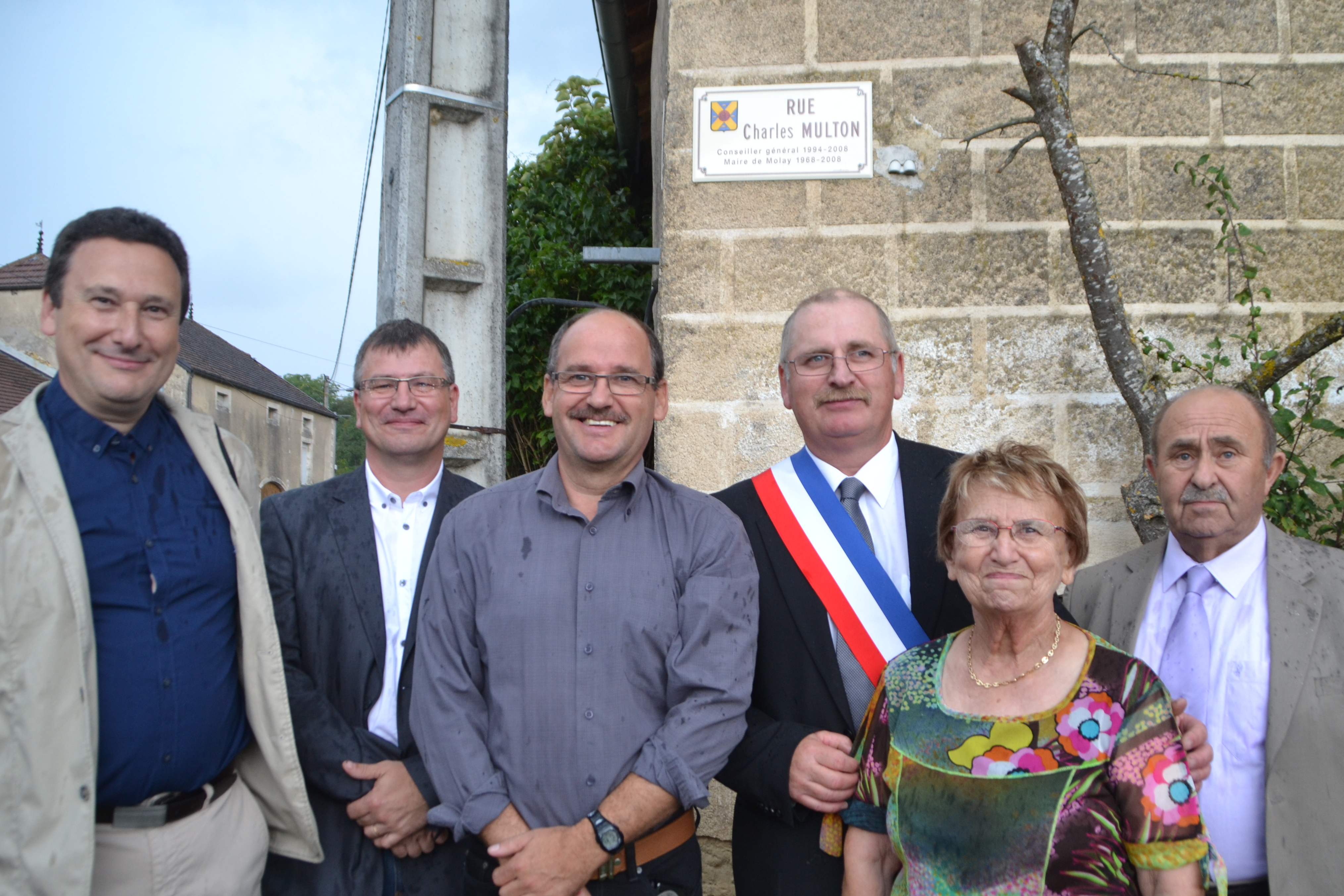 Inauguration rue Charles Multon par le Maire Pascal Doussot et le Conseiller Général Serge Deroy